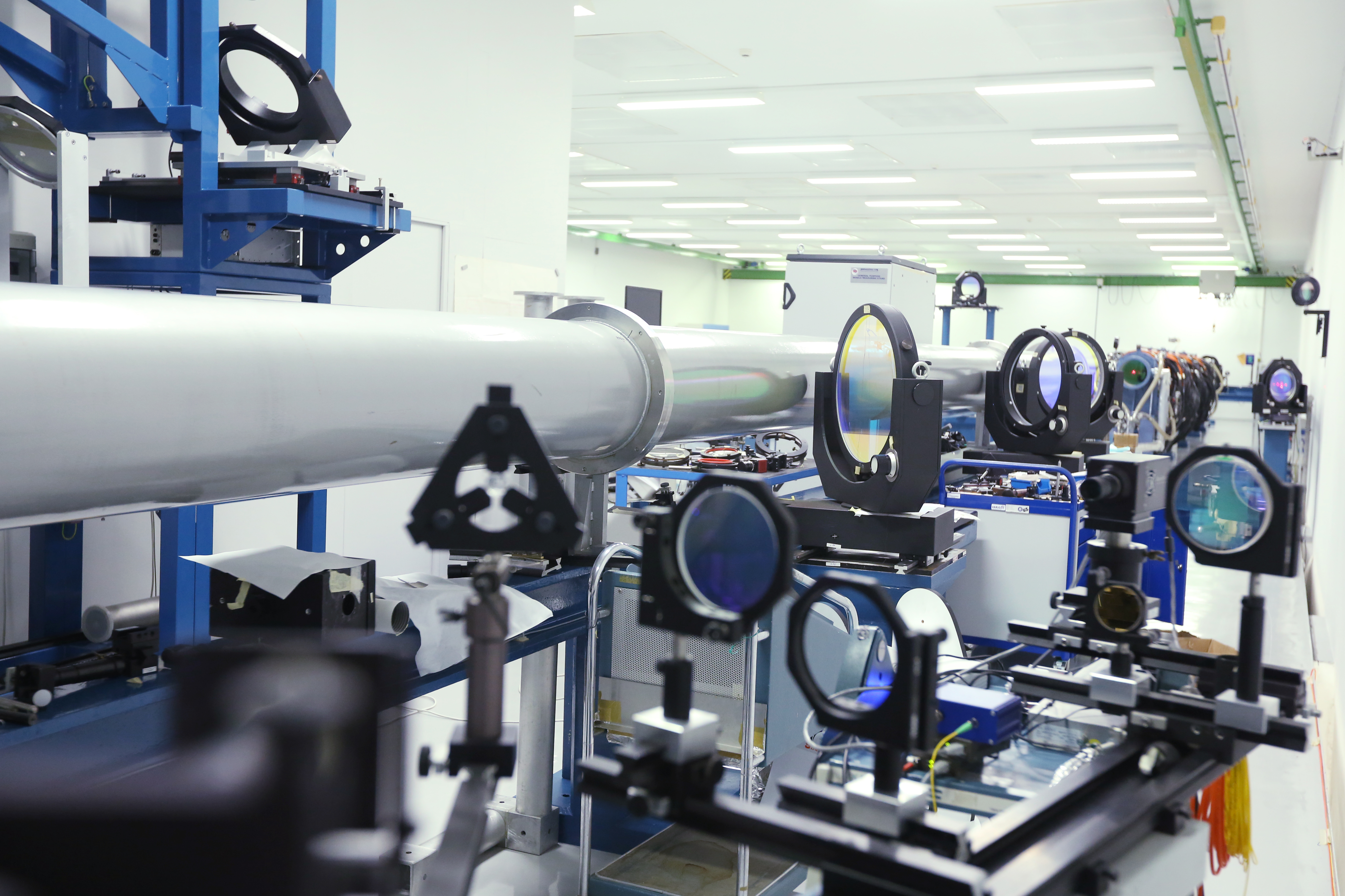 Na fotografii je zachyceno badatelské centrum PALS , kde se nachází obří jódový laserový systém (ASTERIX), jeden ze tří největších laserů v Evropě.